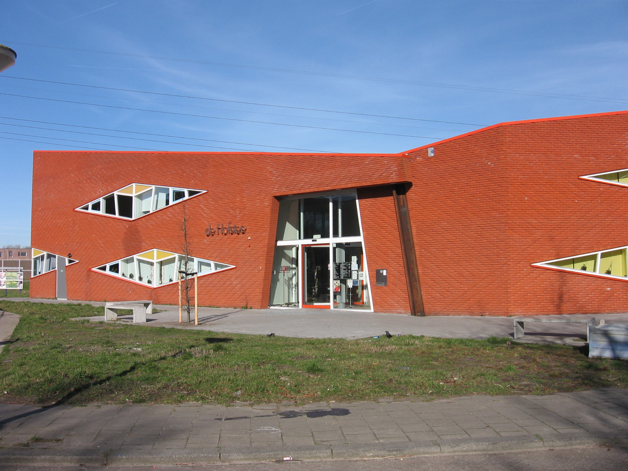 de Hofstede